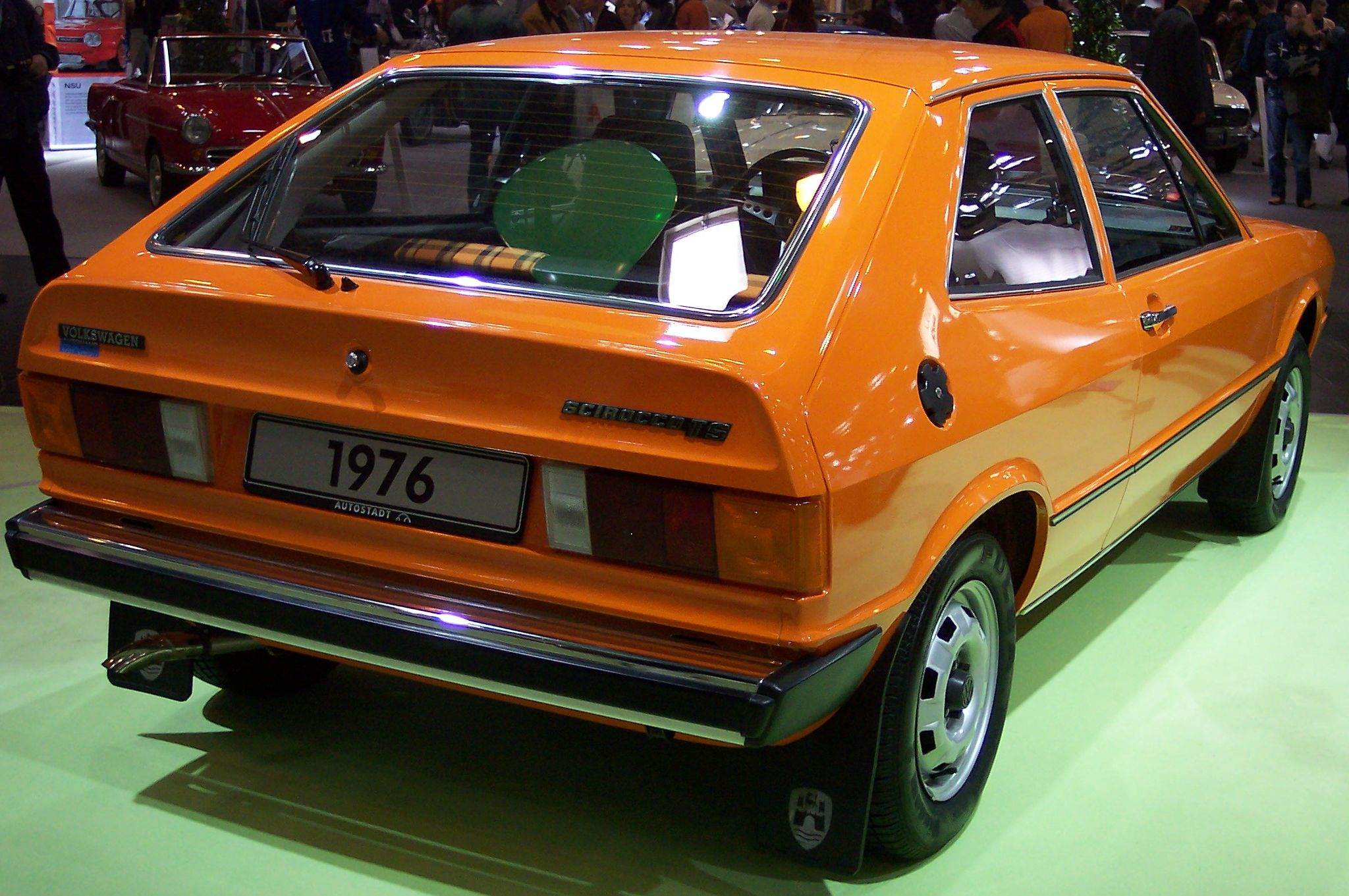 VW Scirocco I